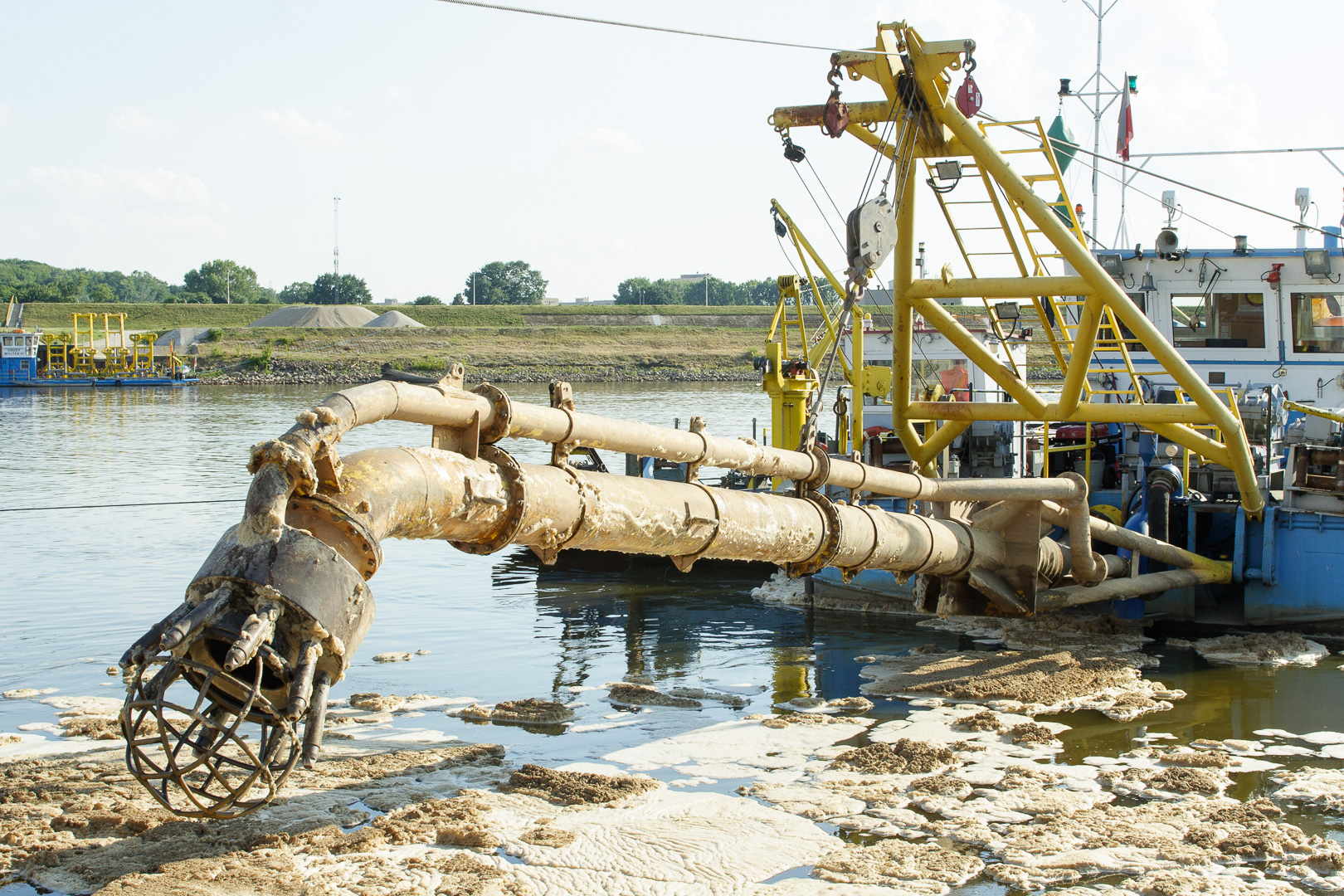 Pogłębiarka „Sawa” - głowica. Po drugiej stronie Wisły statek spulchniacz hydrauliczny „Chudy Wojtek III”. This is a photography of Natura 2000 protected area with ID PLB140004